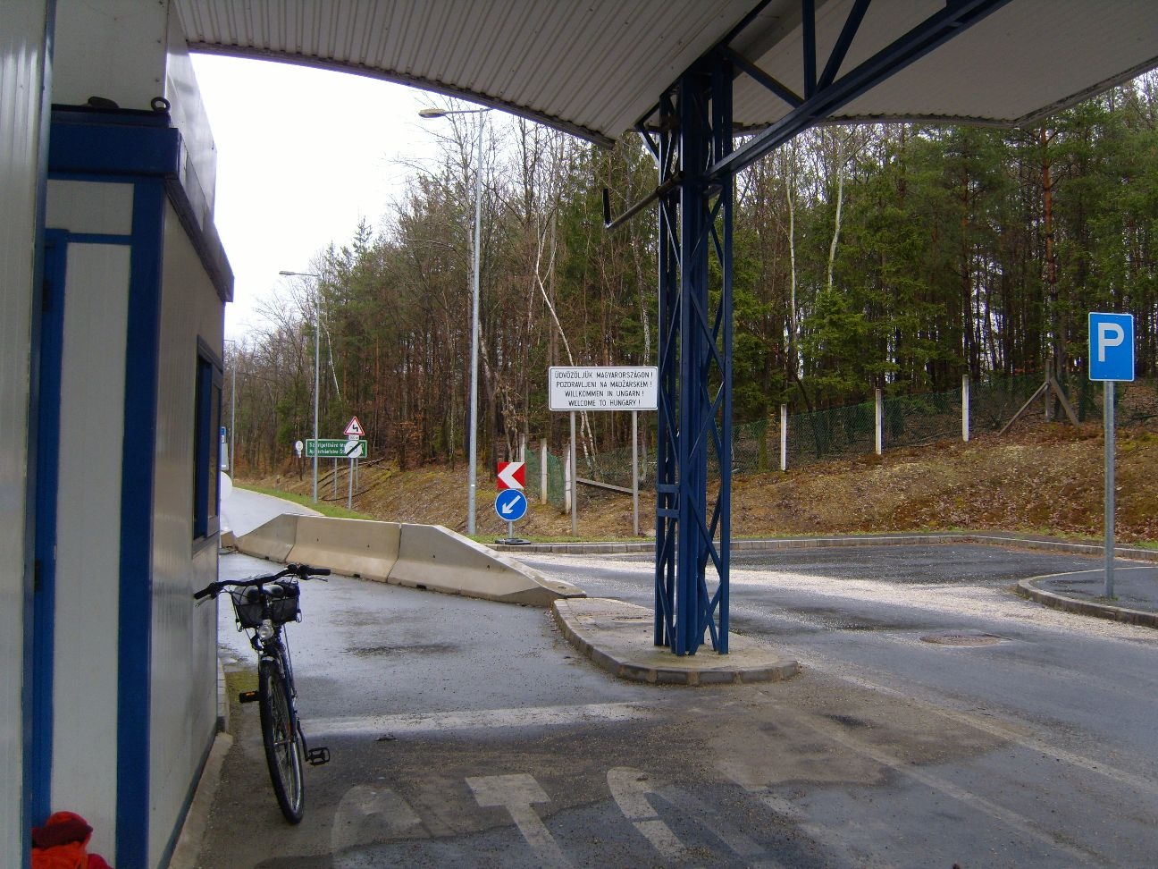 diesmal bei Regen